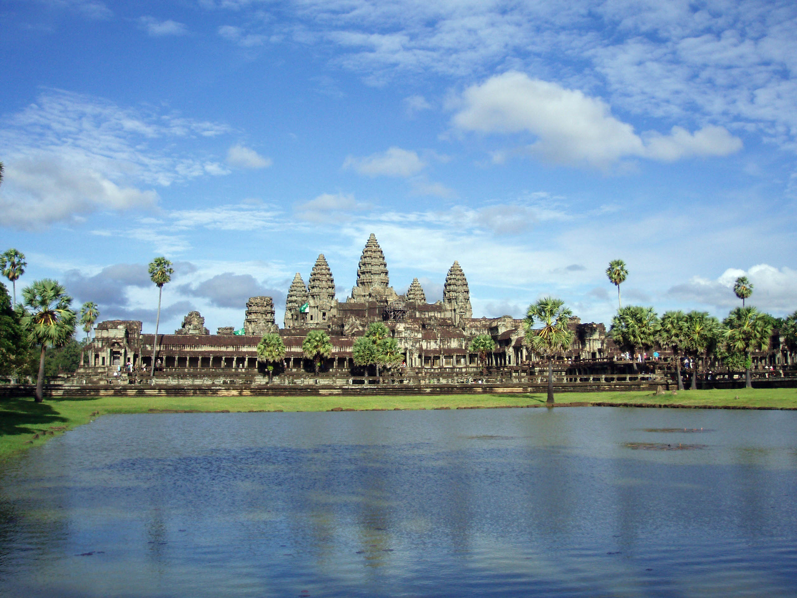 Templo de Angkor Wat en Camboya